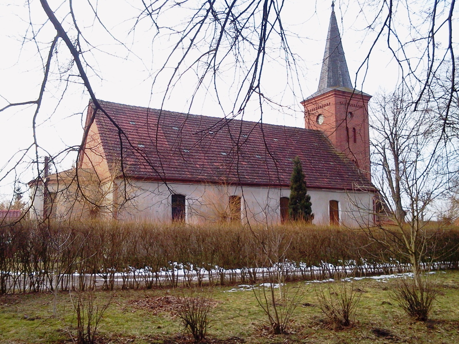 Bełczna - rzymskokatolicki kościół parafialny p.w. św. Apostołów Piotra i Pawła